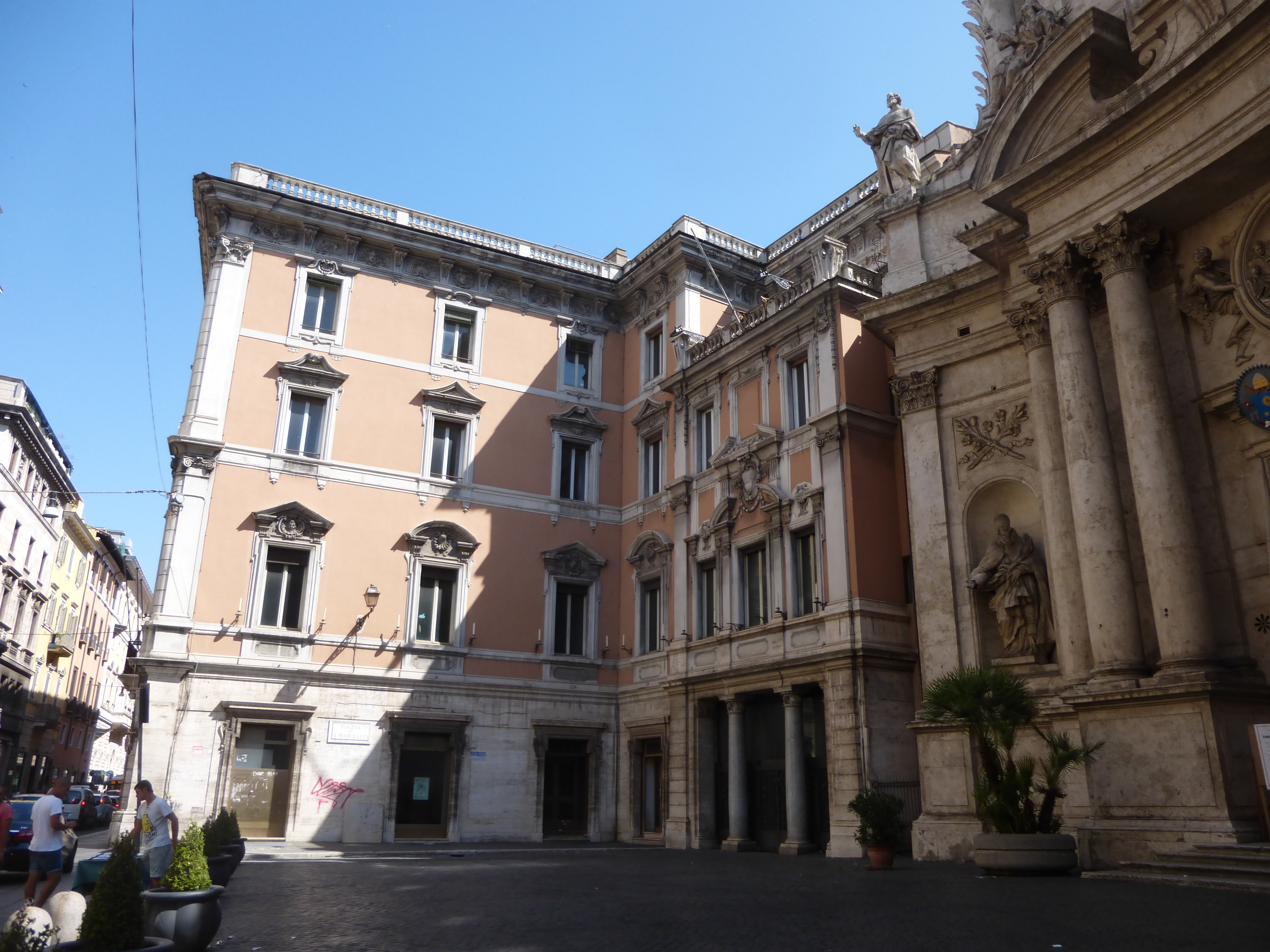 Roma, piazza di S. Marcello, palazzetto Salviati-Mellini, fronte Corso.